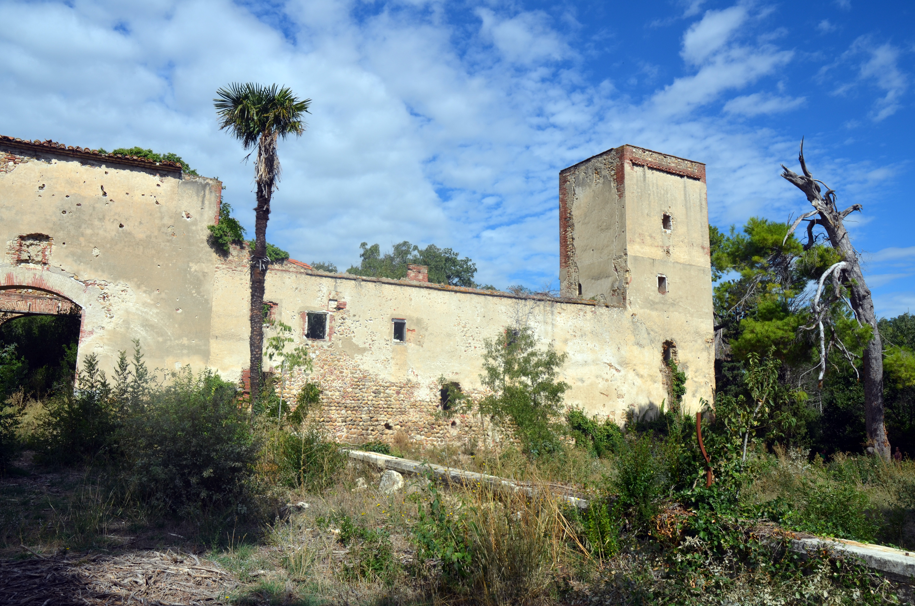 El Masdéu (Rosselló). Muralla sud. Any 2007.